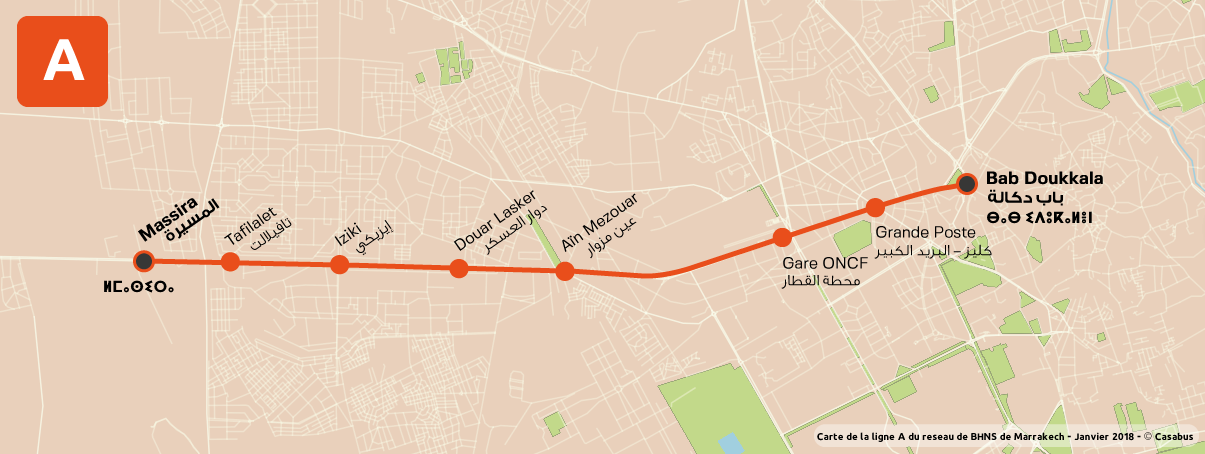 Carte de la ligne A du BHNS de Marrakech, Maroc